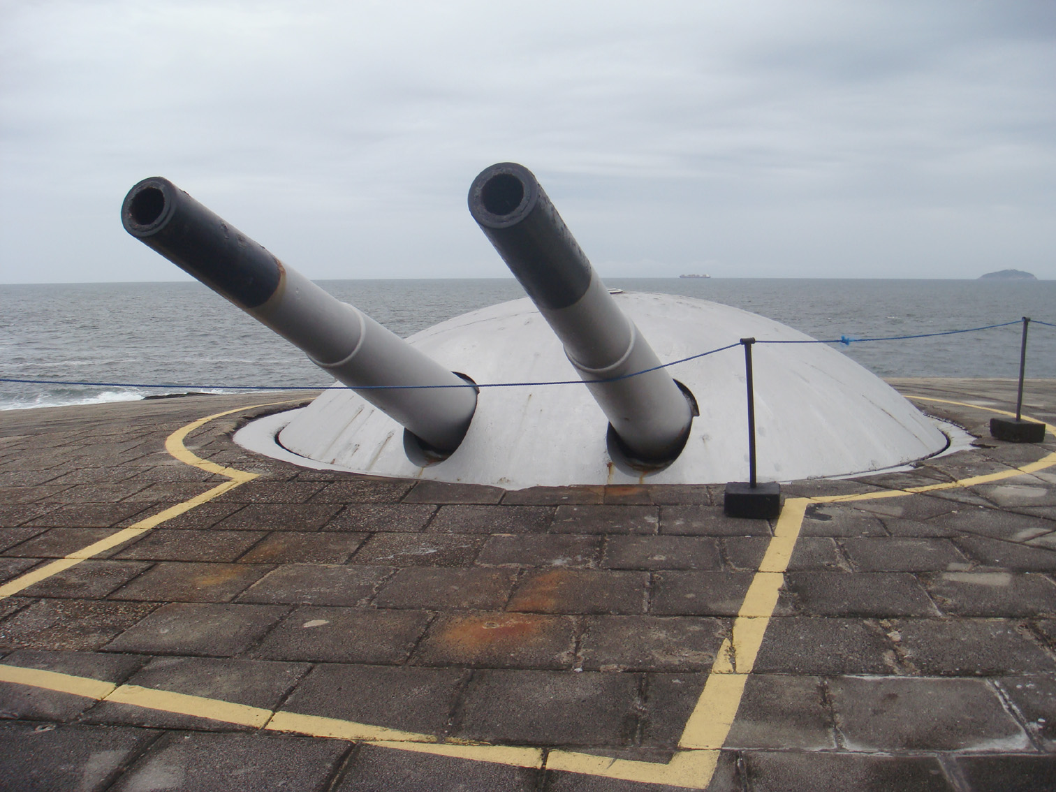 Cannon of Copacabana Fort, Rio de Janeiro, Brazil